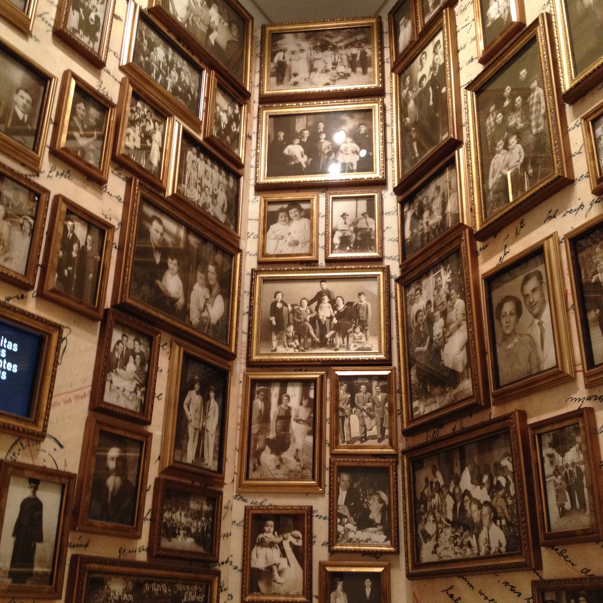 Retratos de centenas de judeus imigrantes nas paredes do Memorial da Imigração Judaica.